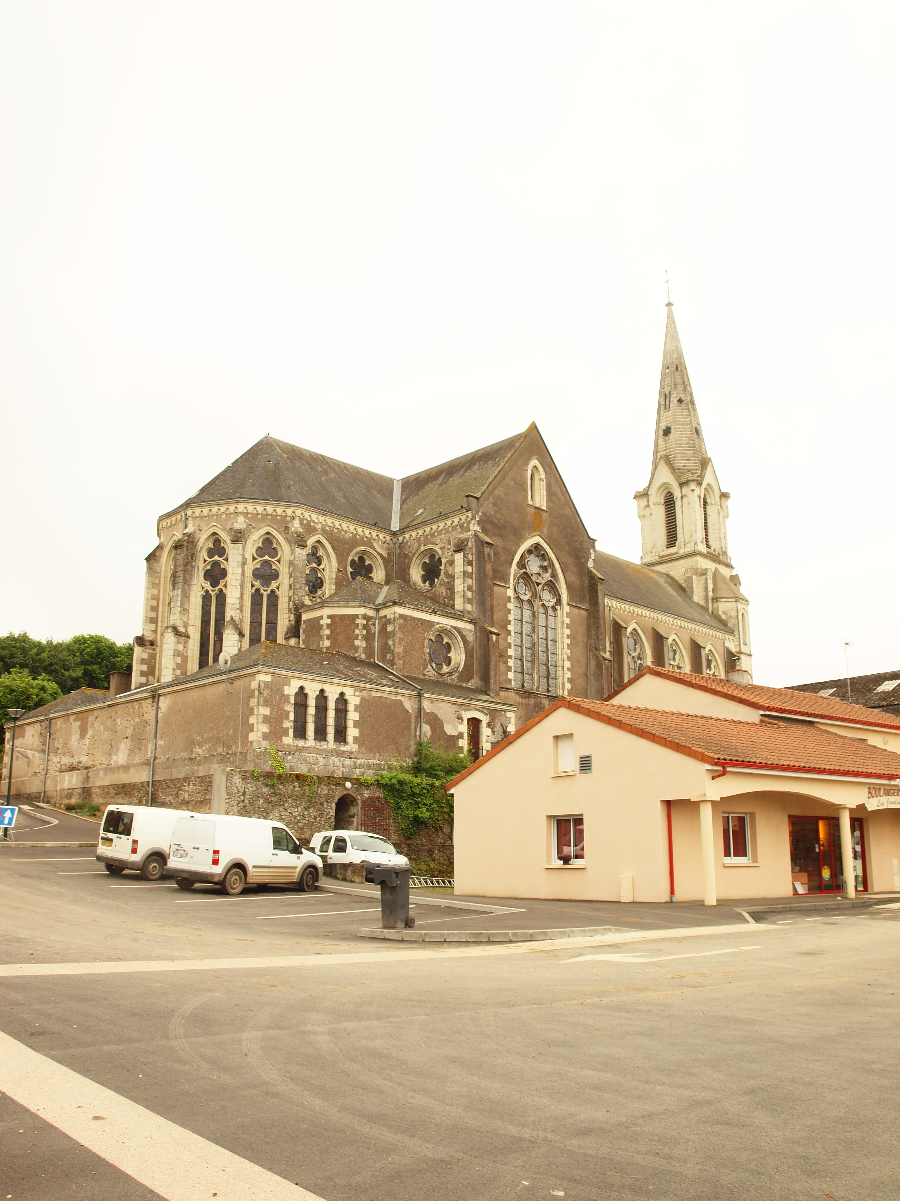 Église Notre-Dame de Drain (Maine-et-Loire, France)